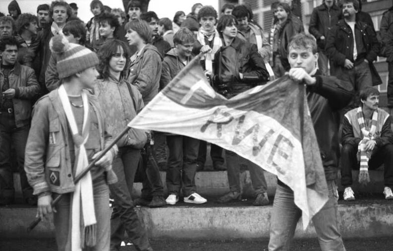 ADN-ZB-Hirndorf / 14.11.1985 Anhänger der Fußballmannschaft des FC Rot-Weiß Erfurt beim Oberliga-Punktspiel am zweiten November-Sonnabend in Brandenburg.